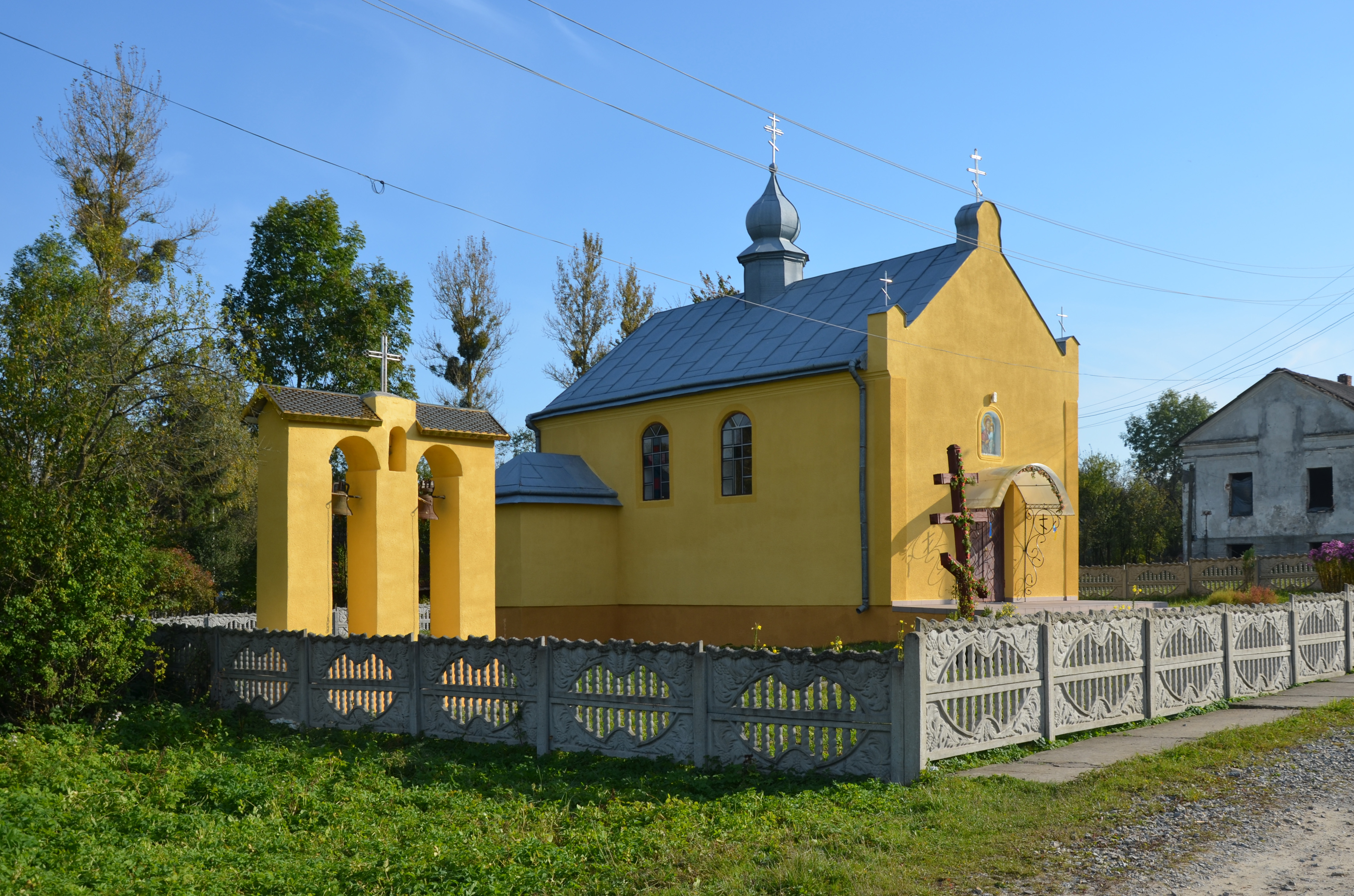 Церква у селі Чуперносів Перемишлянського району Львівської області.